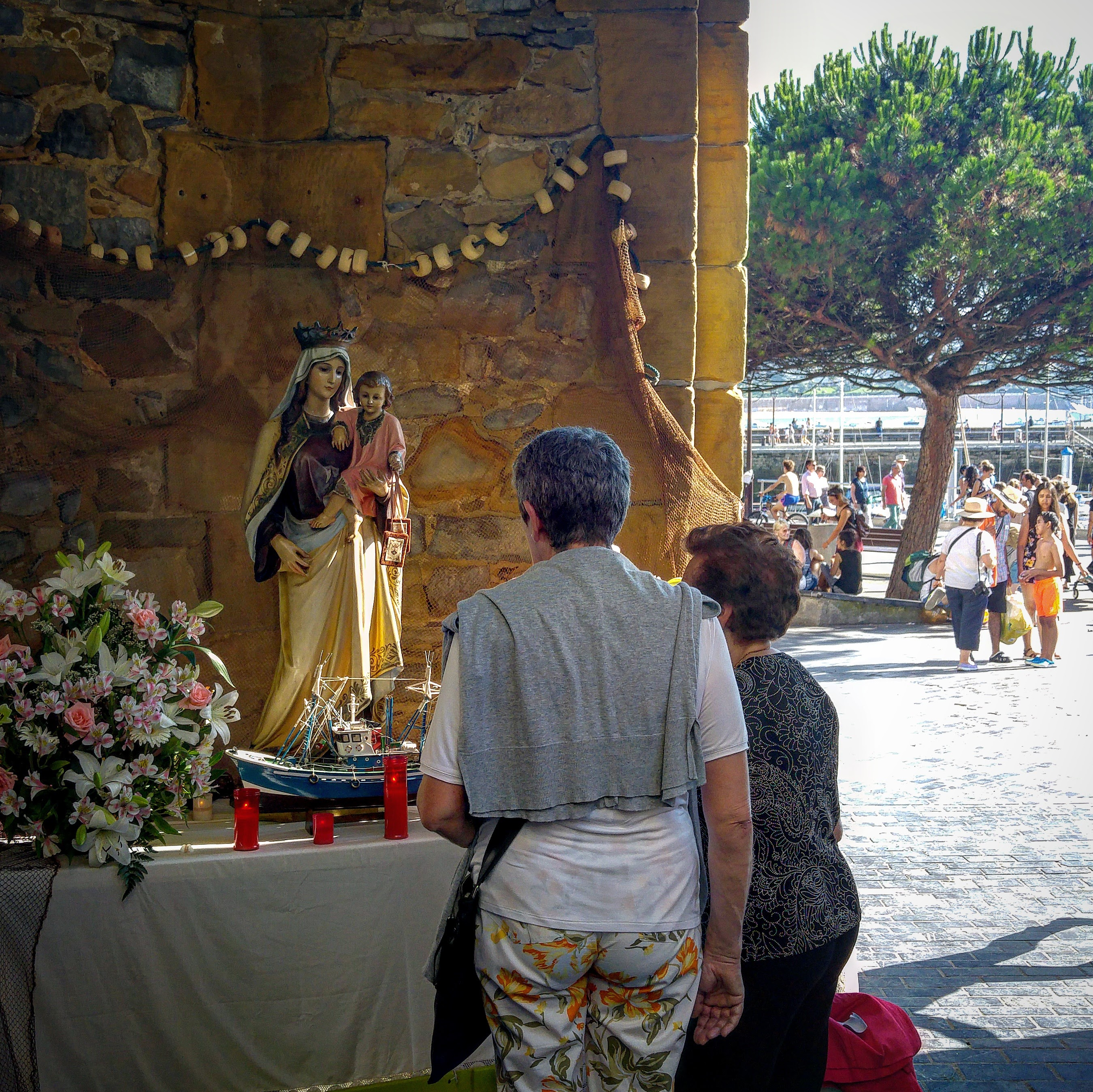 Karmengo Amaren irudia Donostiako portuan.